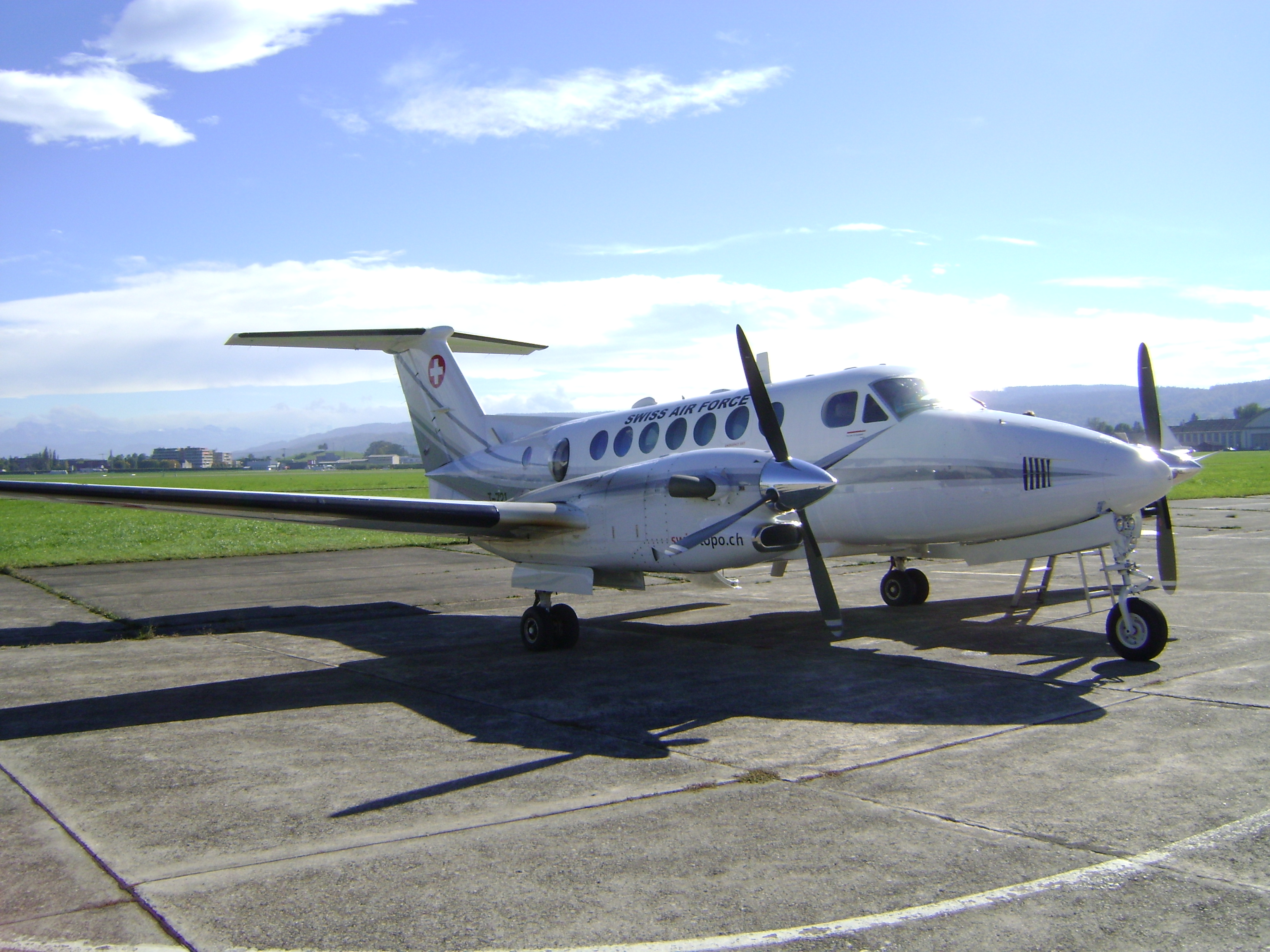 Swiss Air Force Beech Model 350C Super King Air